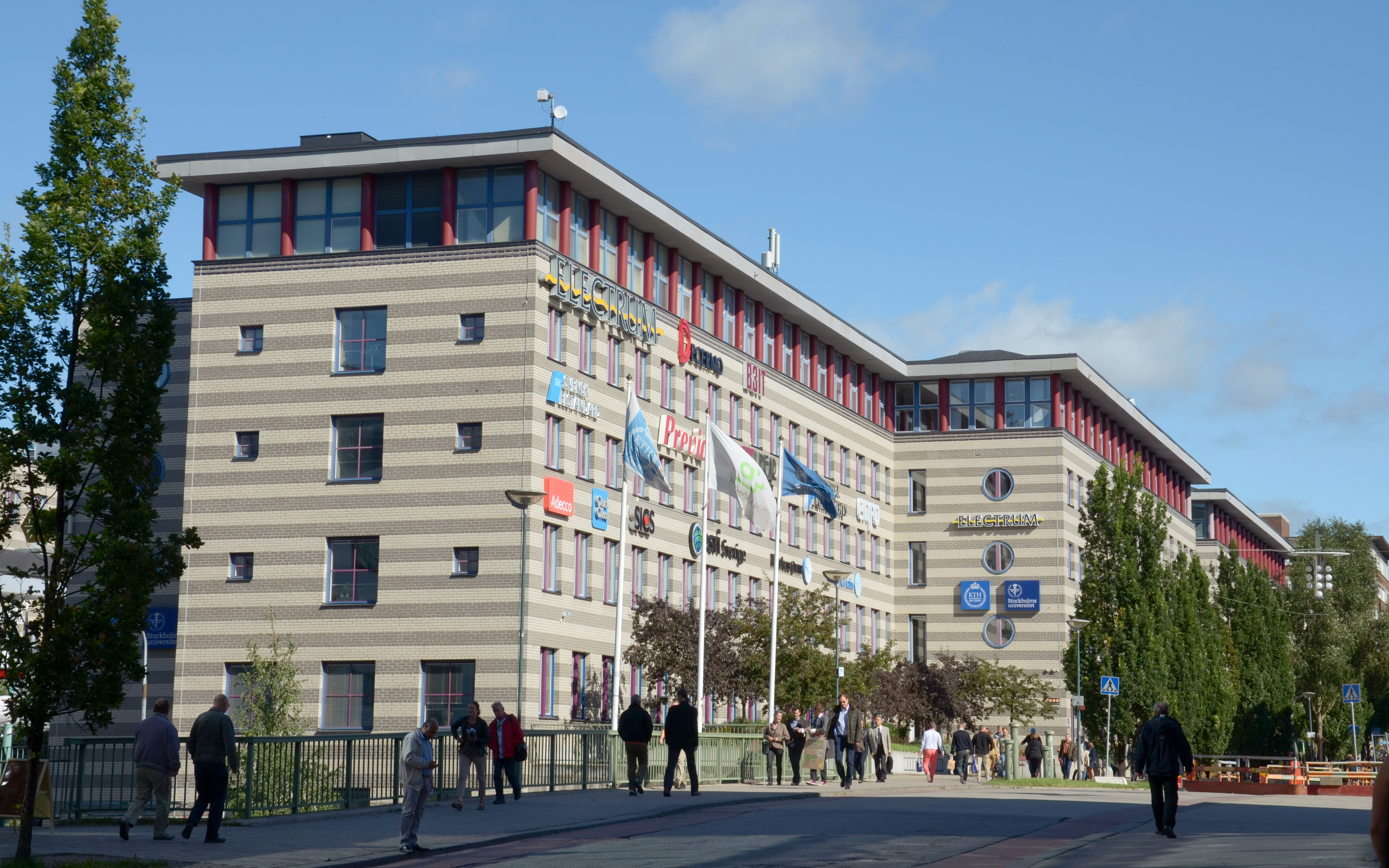 Elektrum. En av byggnaderna på Kungliga Tekniska högskolans campus i Kista.